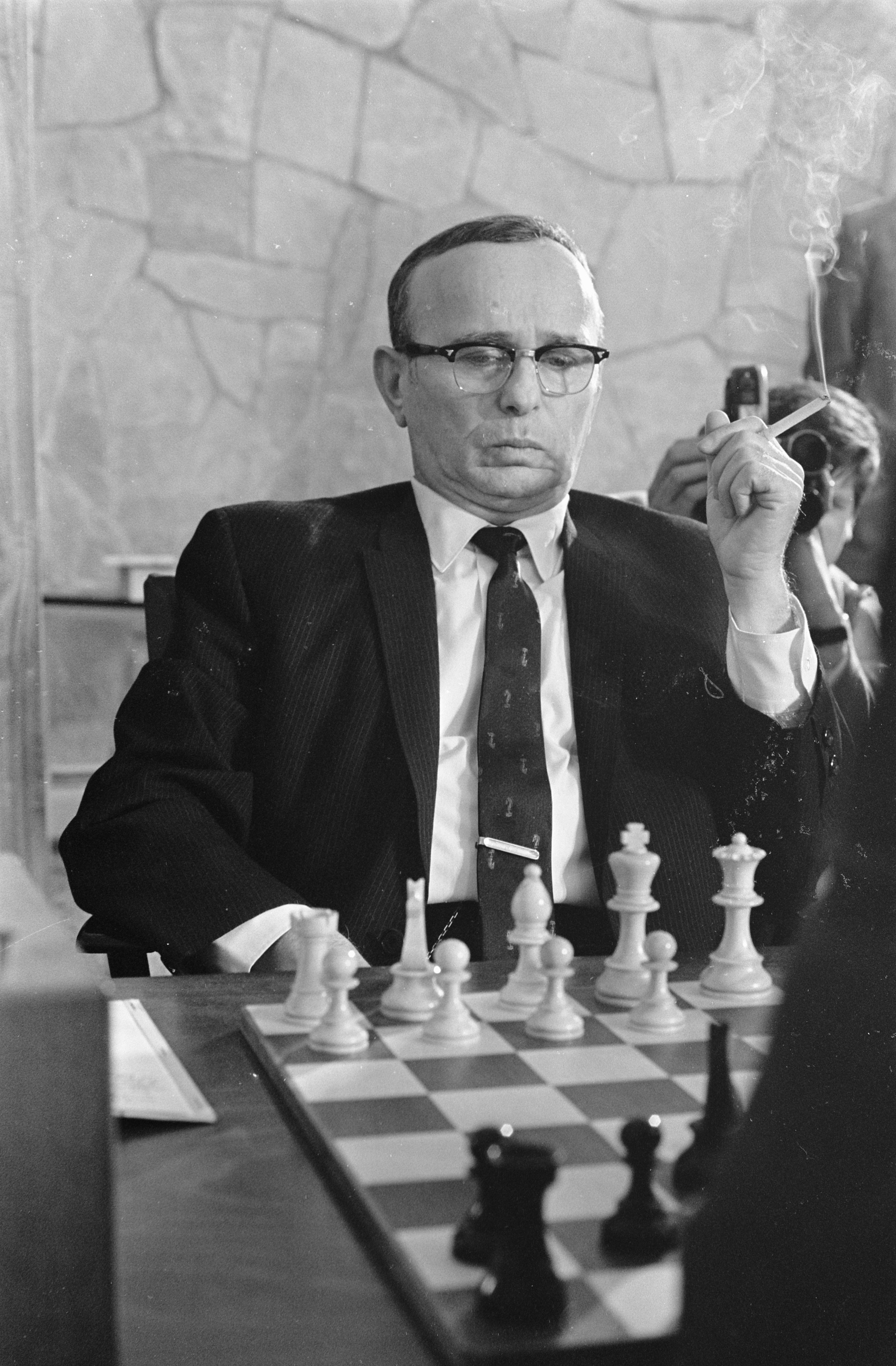 Collectie / Archief : Fotocollectie Anefo Reportage / Serie : [ onbekend ] Beschrijving : Kandidaten toernooi Kortsjnoi tegen Reskevsky. Reskevesky tijdens wedstrijd (USA) Datum : 8 mei 1968 Trefwoorden : kandidaten, schaken, toernooien Persoonsnaam : Kortsjnoi, Viktor, Reshevsky, Samuel Fotograaf : Kroon, Ron / Anefo Auteursrechthebbende : Nationaal Archief Materiaalsoort : Negatief (zwart/wit) Nummer archiefinventaris : bekijk toegang 2.24.01.05 Bestanddeelnummer : 921-3316